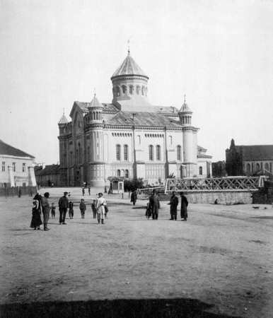 Maironio g. 12, Maironio g. 17, Maironio g. 8, Užupio g.